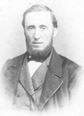 Michiel Hylkes Tromp (1824-1915), burgemeester van Wymbritseradeel. Foto vermoedelijk gemaakt door J.H. Egenberger.